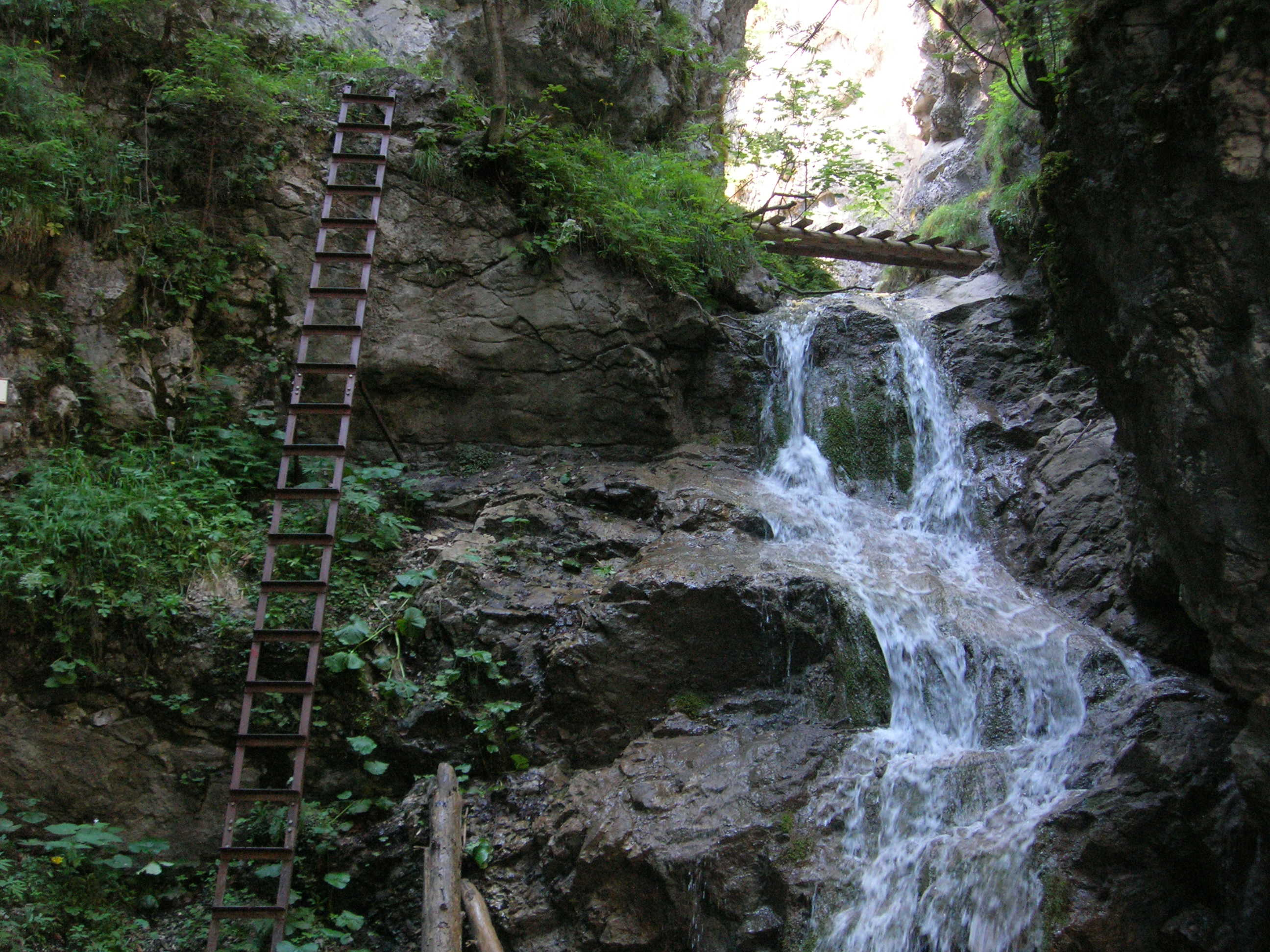 Malý vodopád — Slovenský raj.